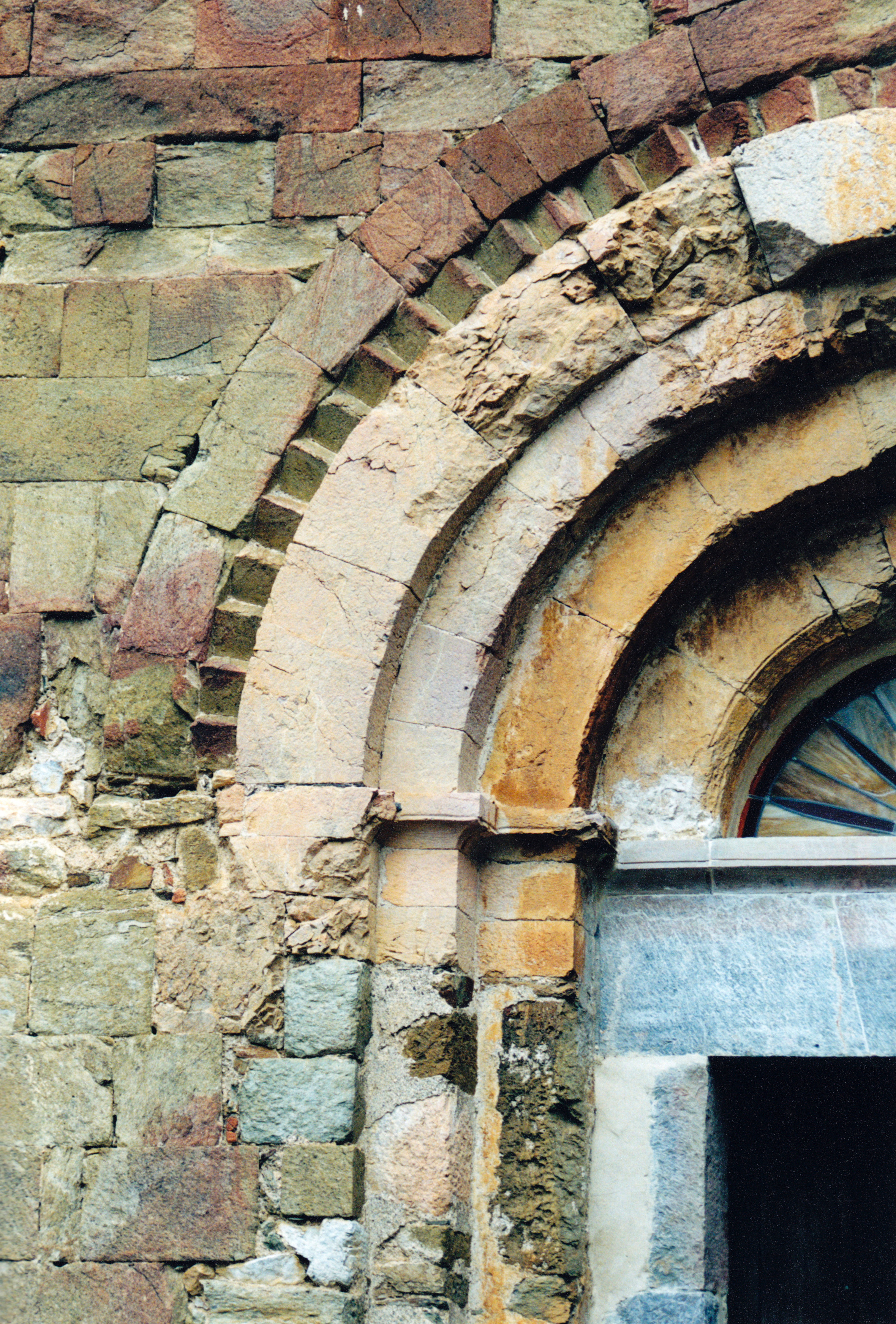 France - Pyrénées-Orientales - Aspres - Église Saint-Félix de Calmeilles